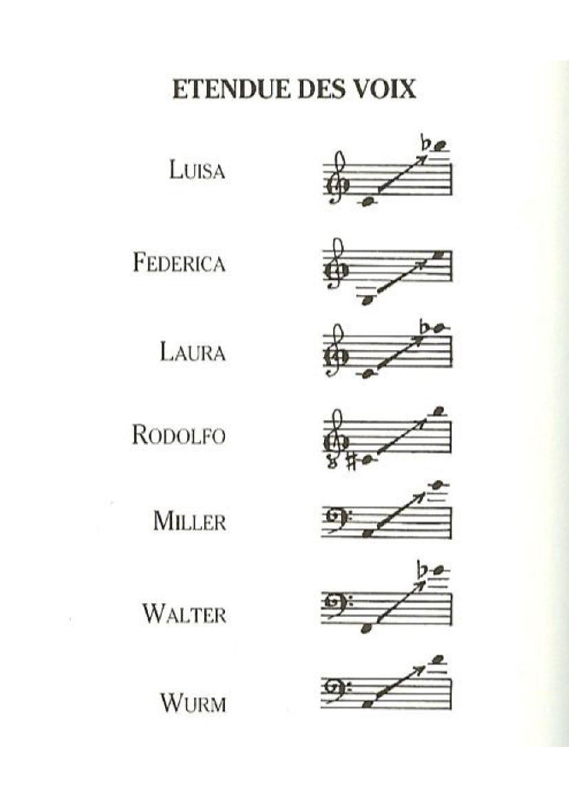 Partition d'un auteur décédé depuis plus de 70 ans